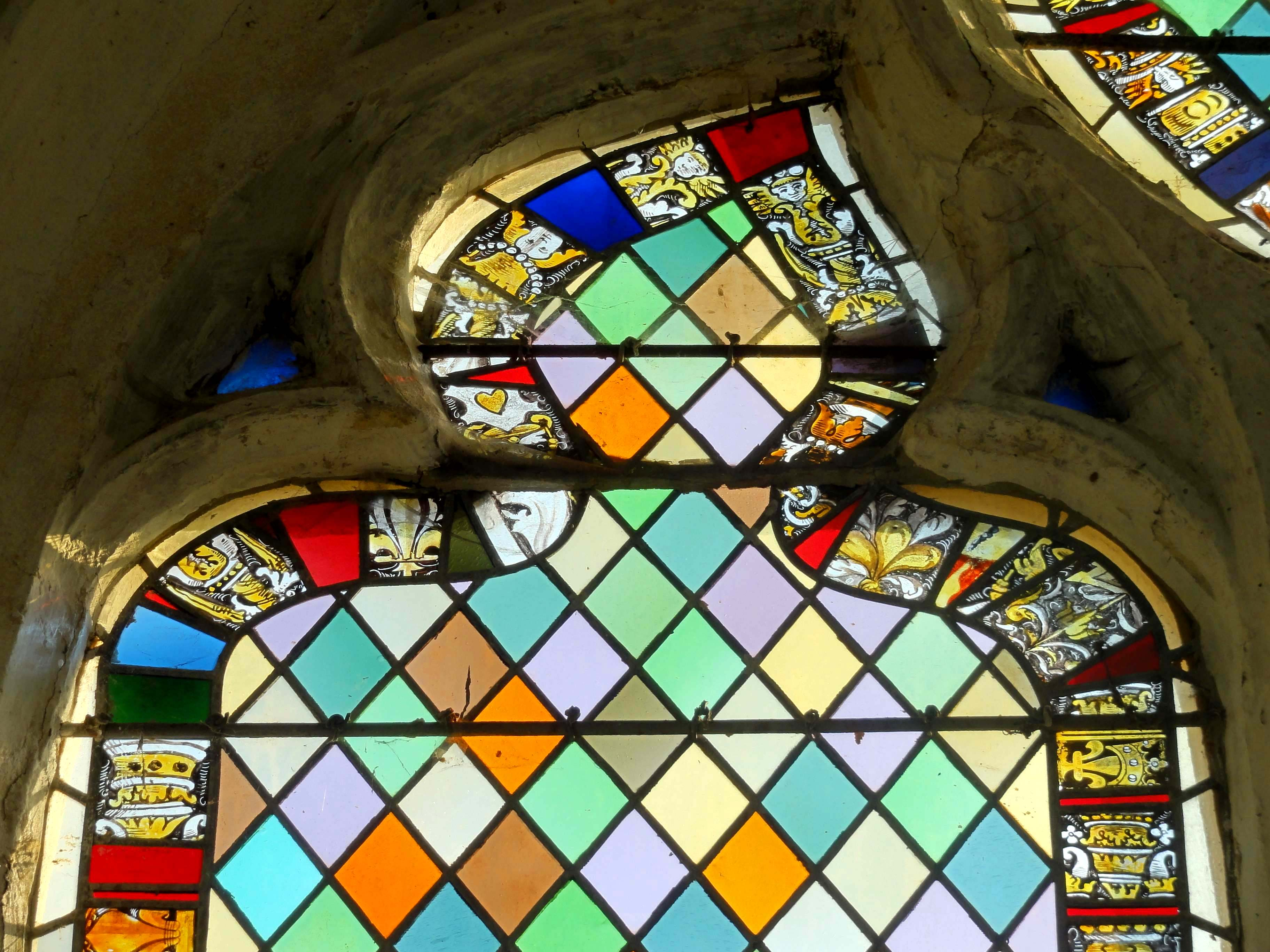 Mobilier de l'église - voir titre.